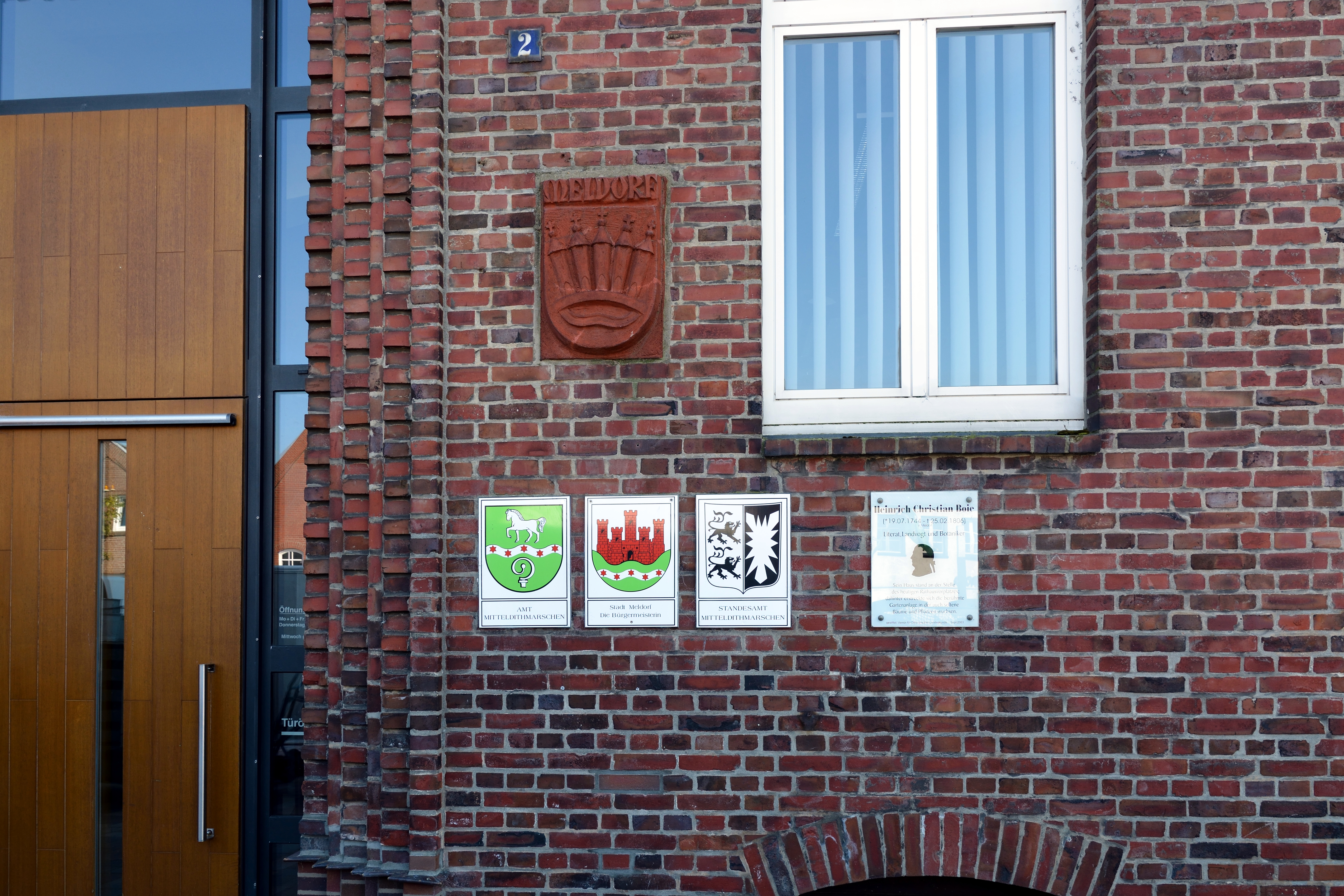 Das Amt Mitteldithmarschen in Meldorf, Zingelstrasse 2. Wappen im Eingangsbereich.